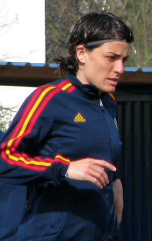 Sandra Vilanova Tous, spanische Nationalspielerin